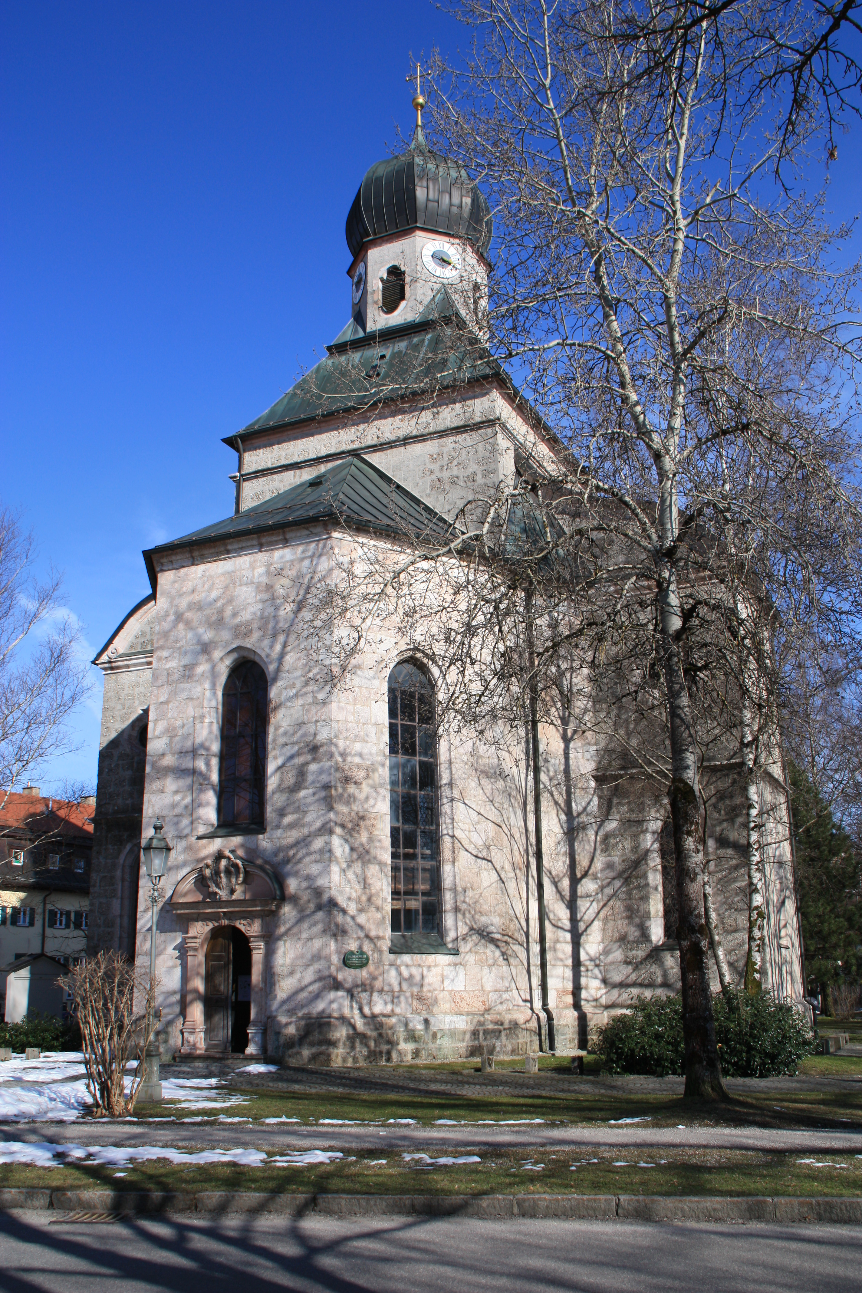 Die Salinenkapelle im ehemaligen Salinenviertel von Traunstein (unterhalb der Stadt am Karl-Theodor-Platz)